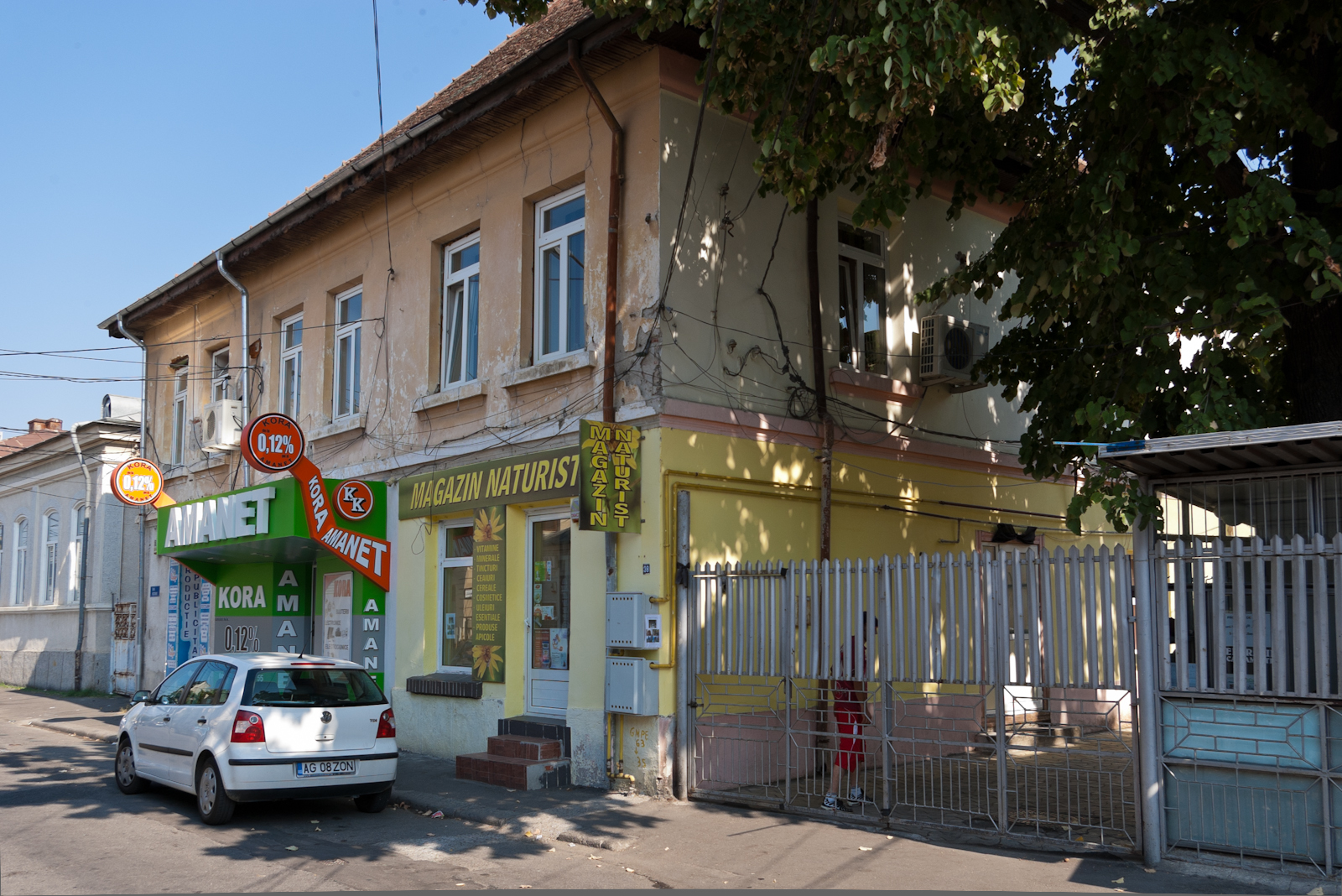 Fotografia prezinta casa de pe str. Victoriei nr. 38, vazuta dinspre S.